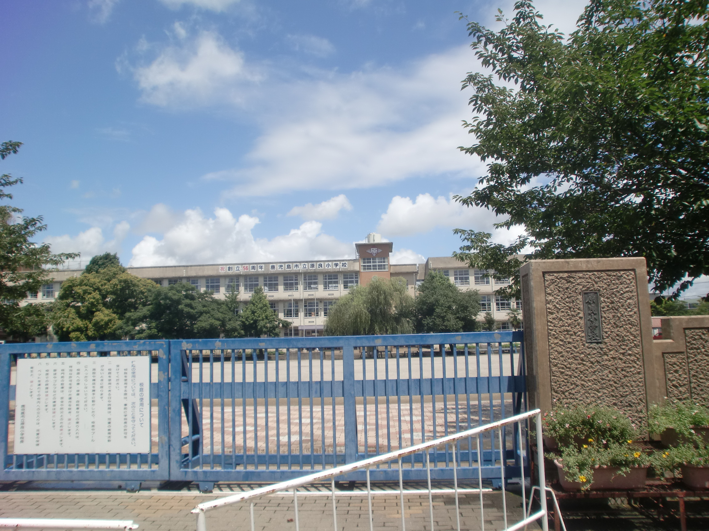 鹿児島市立原良小学校の外観。